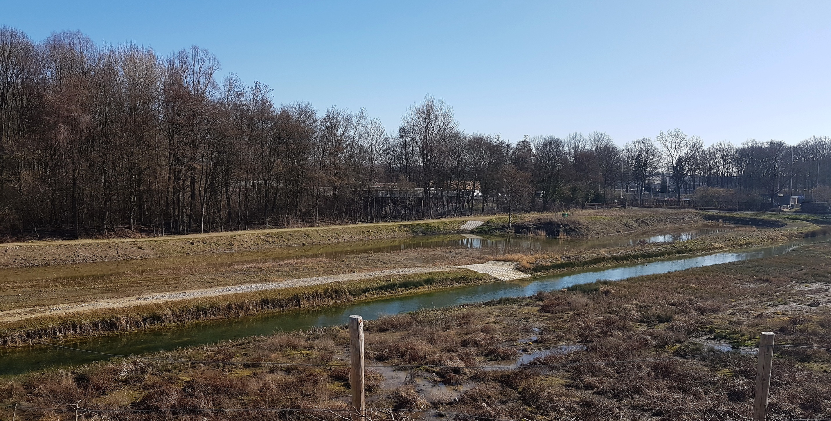 Zicht uit het noordwesten op de voormalige wielerbaan uit 1895 in het noordelijk deel van het Geusseltpark in Maastricht-Oost.